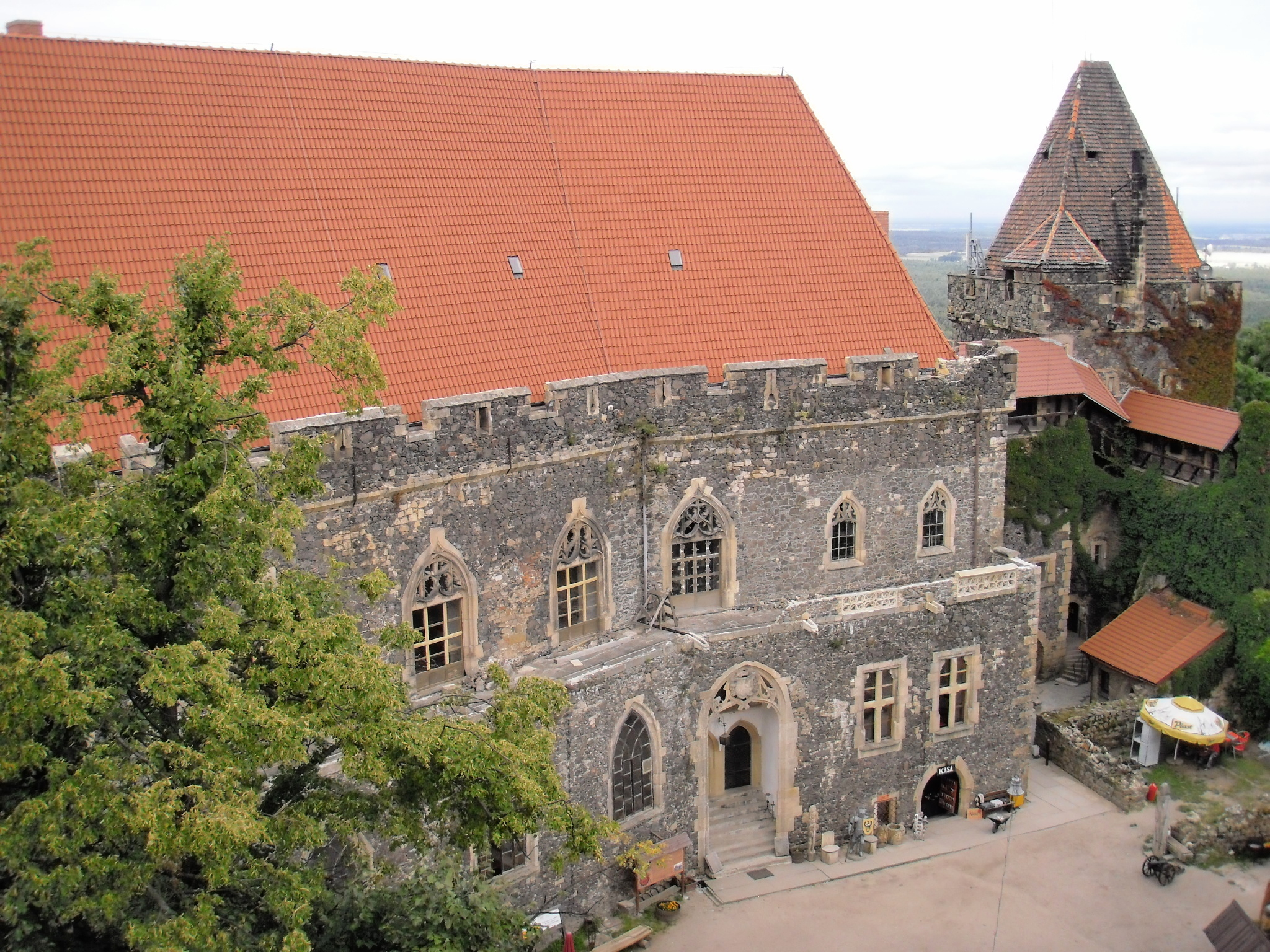 Grodziec, zamek, XV, XIX